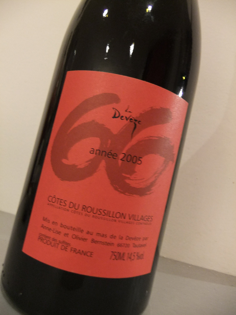 Étiquette d'une bouteille de vin du Languedoc Roussillon.